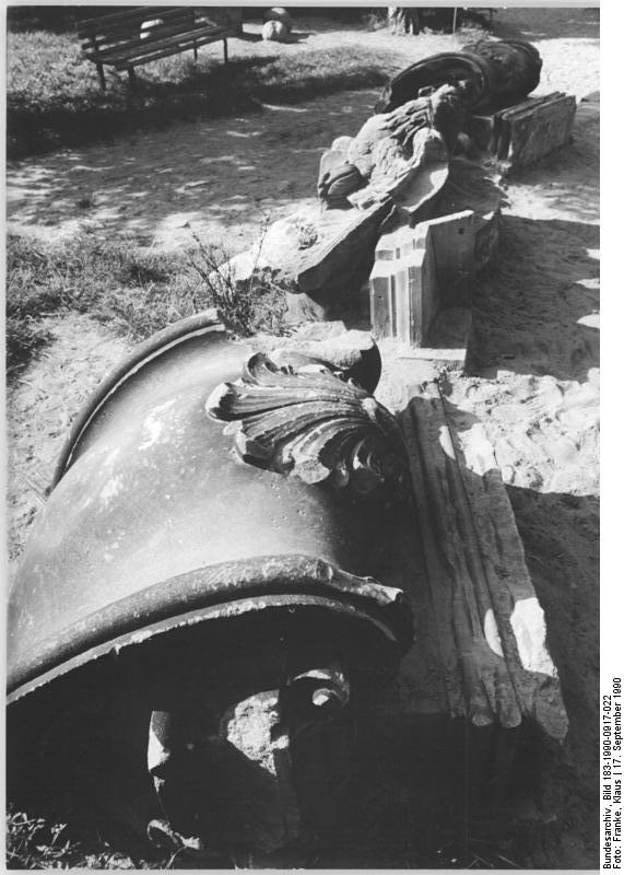 ADN Klaus Franke BER-22-17.9.90 Berlin: Schloß-Trümmer Im vierten Hinterhof der Kastanienallee 12 gestalten eine Bürgerinitative und eine Gruppe Bildhauer mit Elementen des ehemaligen Berliner Schlosses eine erholsame Oase. Die dekorativen Stuckteile, Architekturdetails und Säulen des schwer beschädigten Schlosses, das 1950 auf Weisung der SED-Führung abgerissen wurde, holten sie von einer Müllhalde im Ahrensfelder Wald.